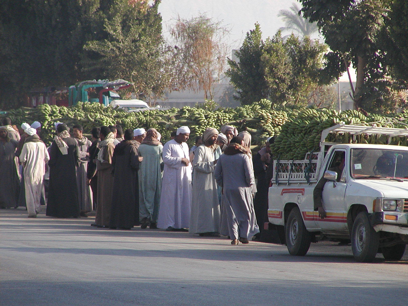 Le marché aux bananes sur le bord de la route, Esna, Égypte.